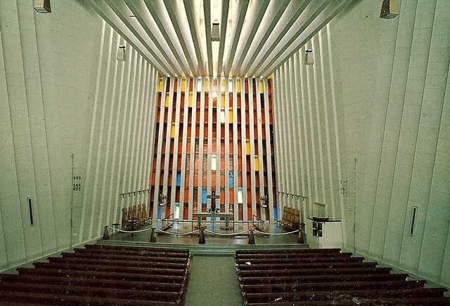 Kirkelandet kirke